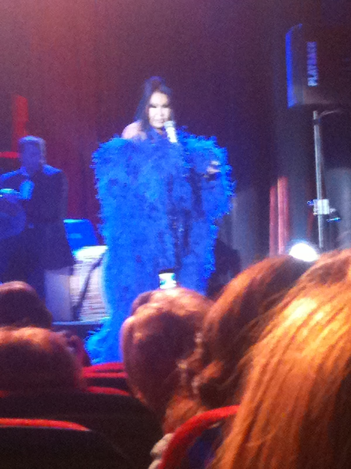 Adnan Şenses, Bülent Ersoy, Muazzez Abacı üçlüsü tarafından Bostancı Kültür Merkezi'nde düzenlenen Klasik Türk Müziği konserinde Bülent Ersoy sahne performansıyla, 2012.